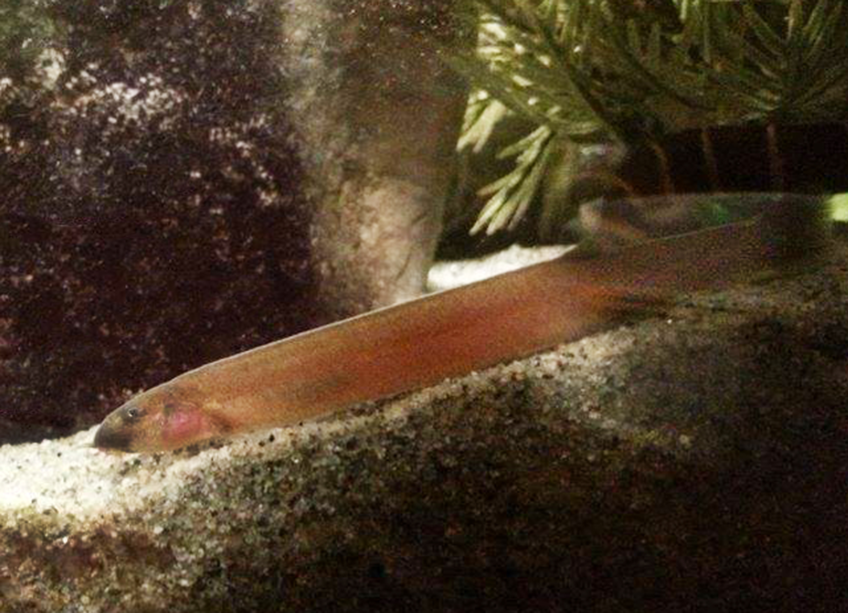 Esemplare di P. oblonga in acquario